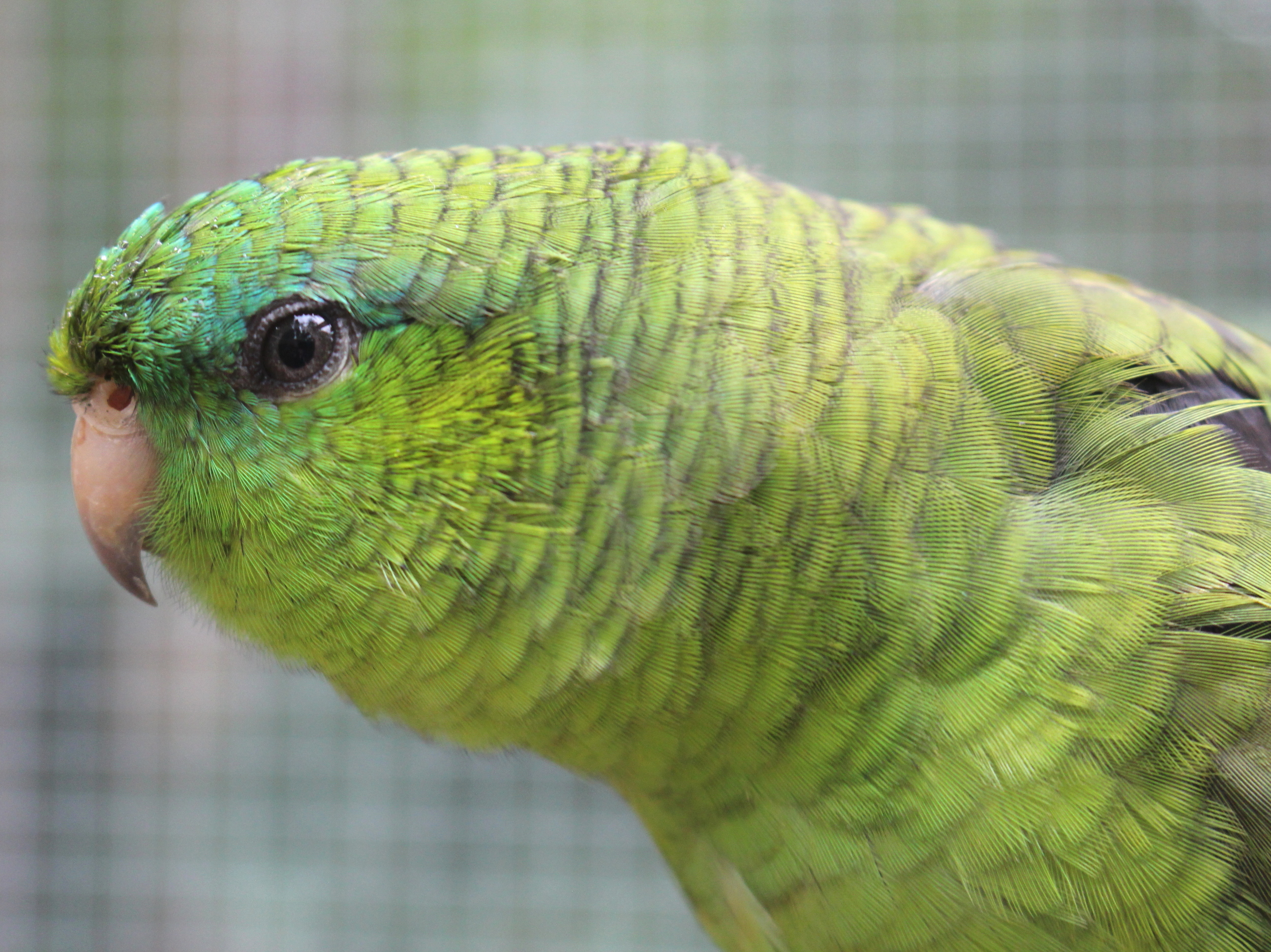 Katharinasittich